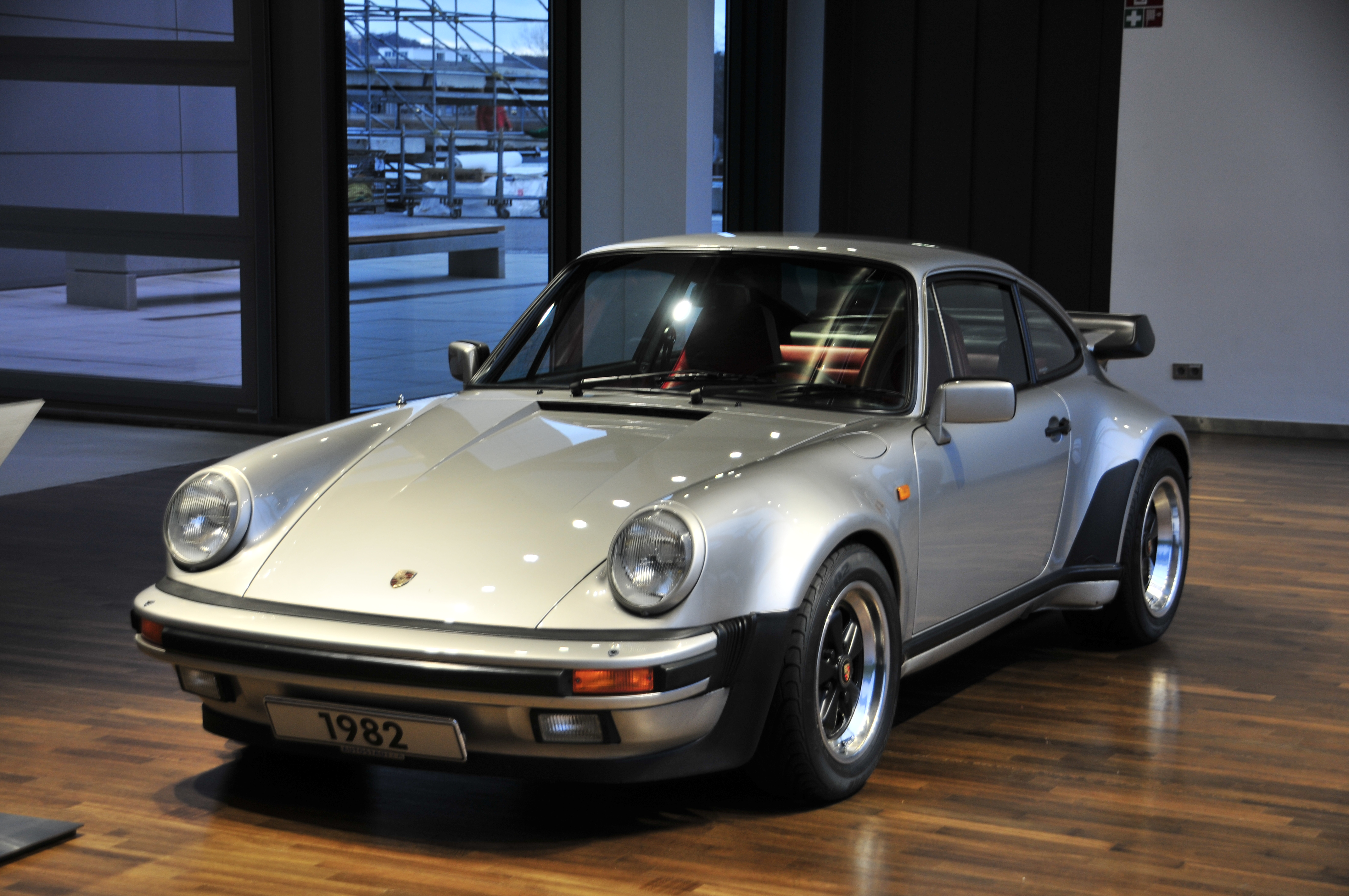 Fahrzeug in der Autostadt Wolfsburg